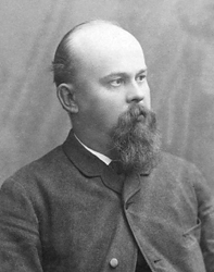 Kaarlo Viljakainen oli Aamulehden päätoimittajana yli 20 vuotta.